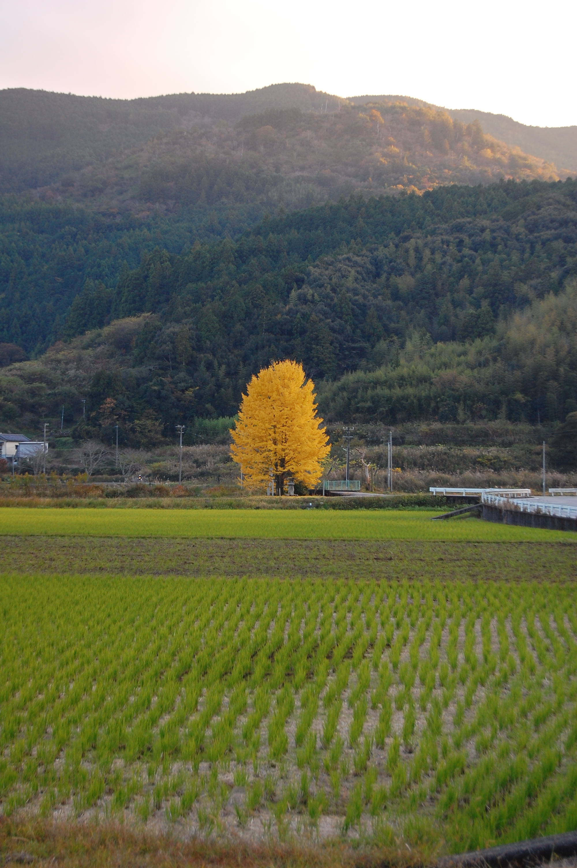 Blazing alone